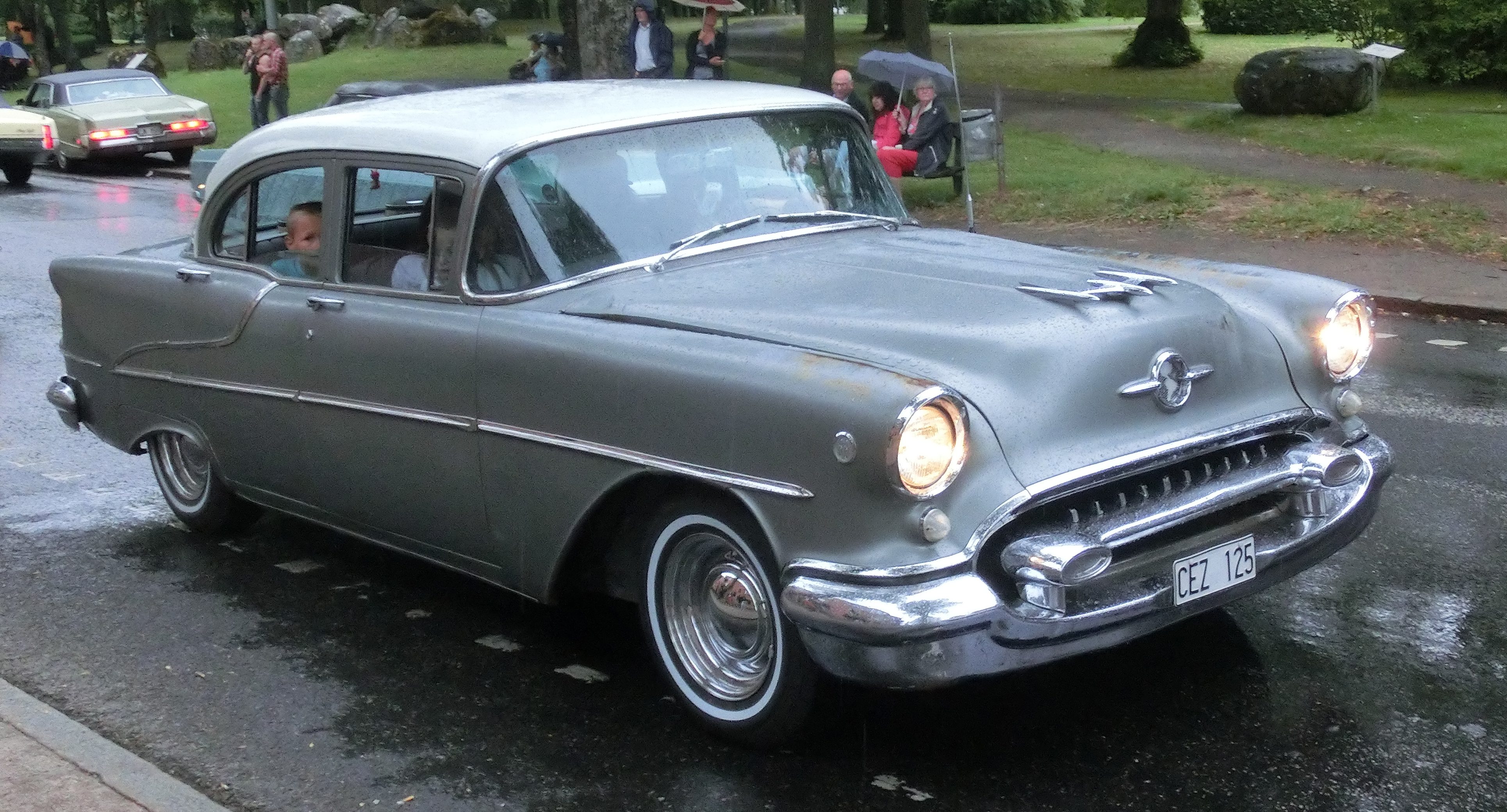 En silverfärgad Oldsmobile 88 av årsmodell 1955 på cruising i Falköping 2014-07-26. Bilen kör på "Ströget" (Sankt Olofsgatan) i Falköping, Västergötland, Västra Götalands län, Sverige.